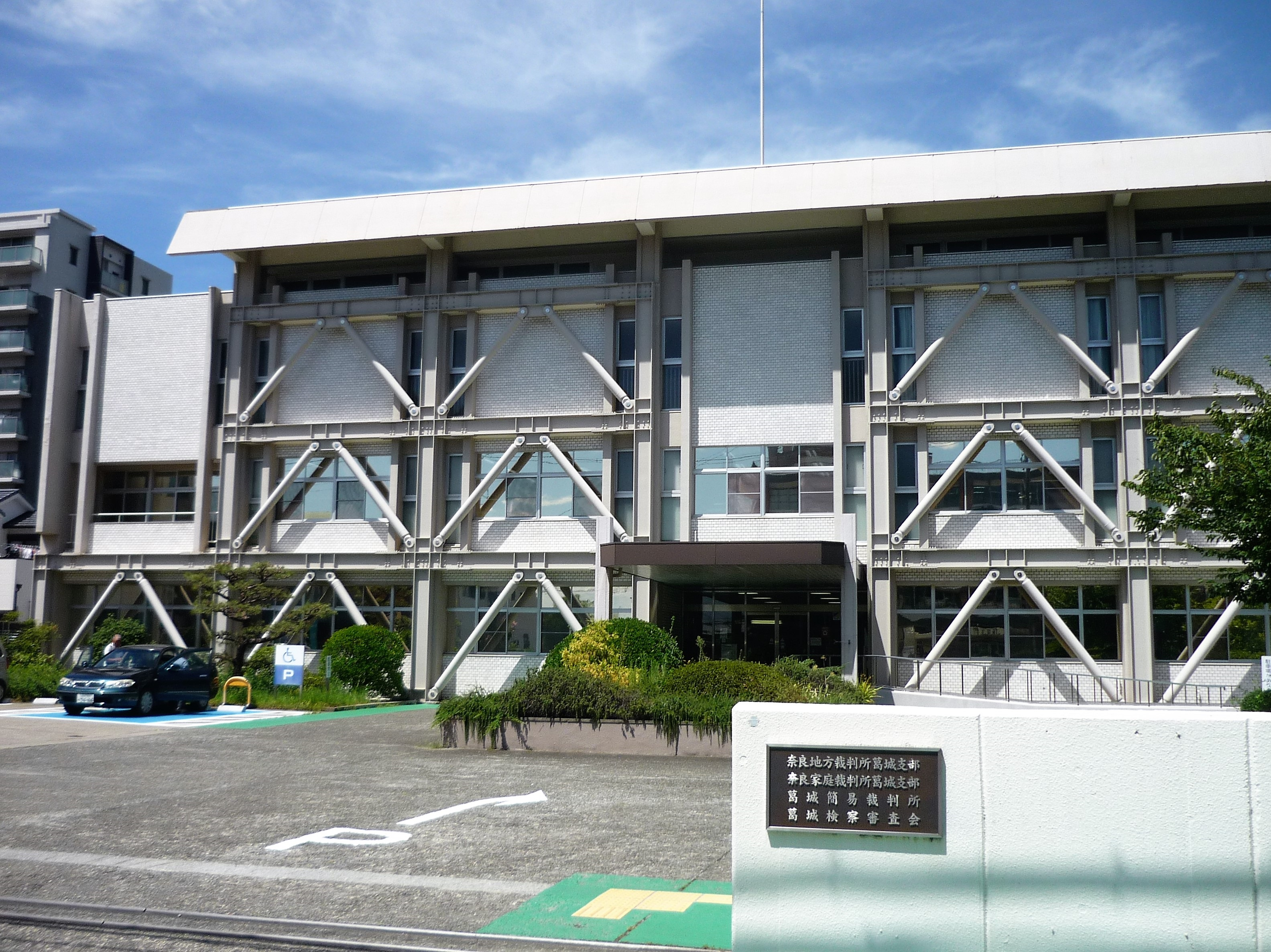 奈良地方裁判所葛城支部、奈良家庭裁判所葛城支部、葛城簡易裁判所